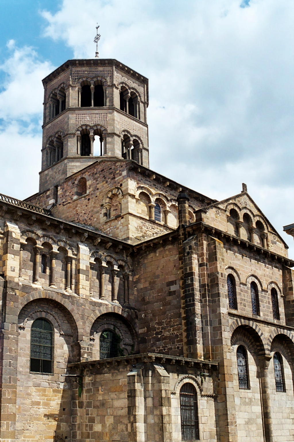 France - Auvergne - Puy-de-Dôme - Église Saint-Austremoine d'Issoire